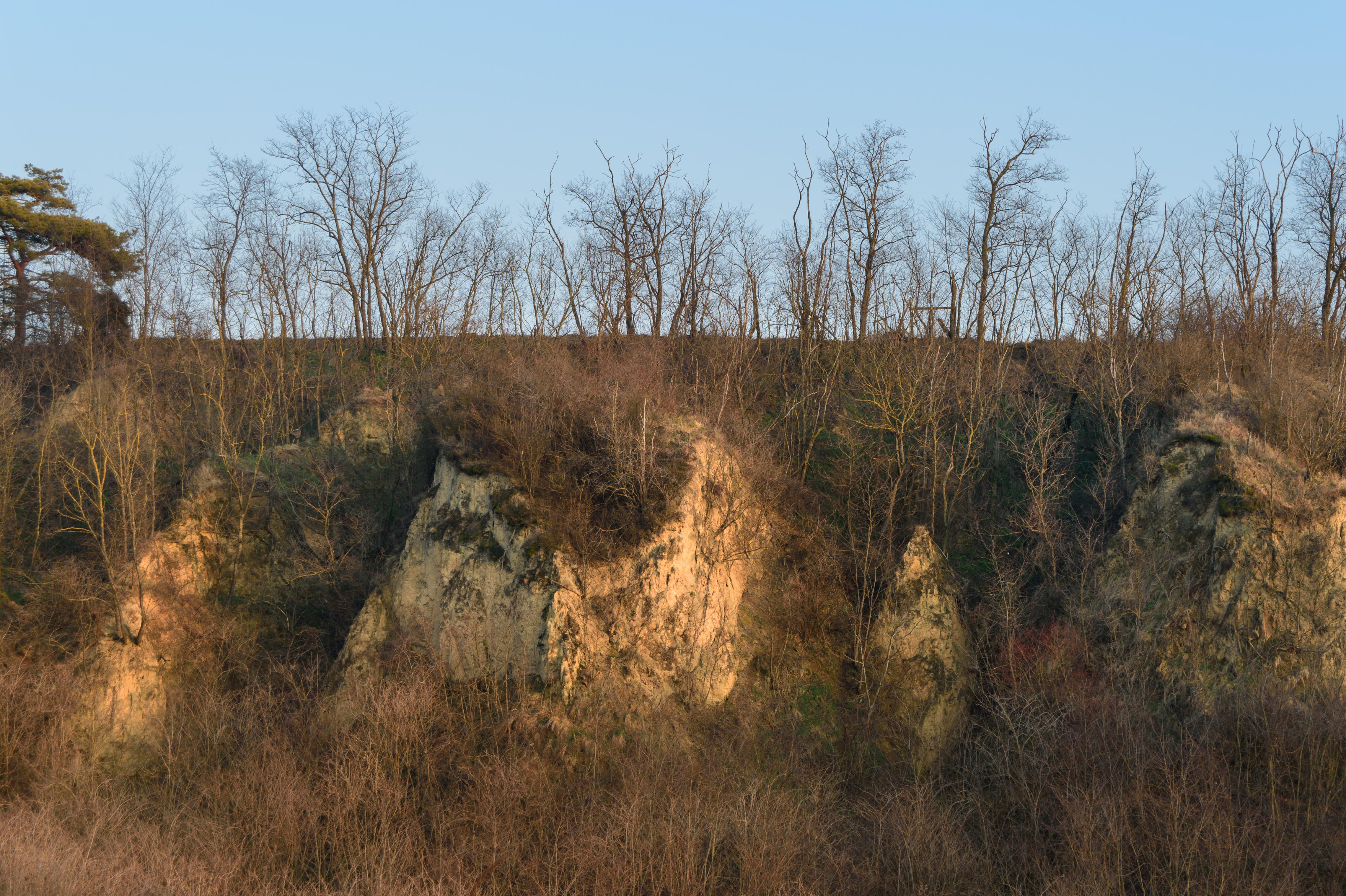 Lösswand „Neun Mauna“ This media shows the natural monument in Lower Austria with the ID TU-010.